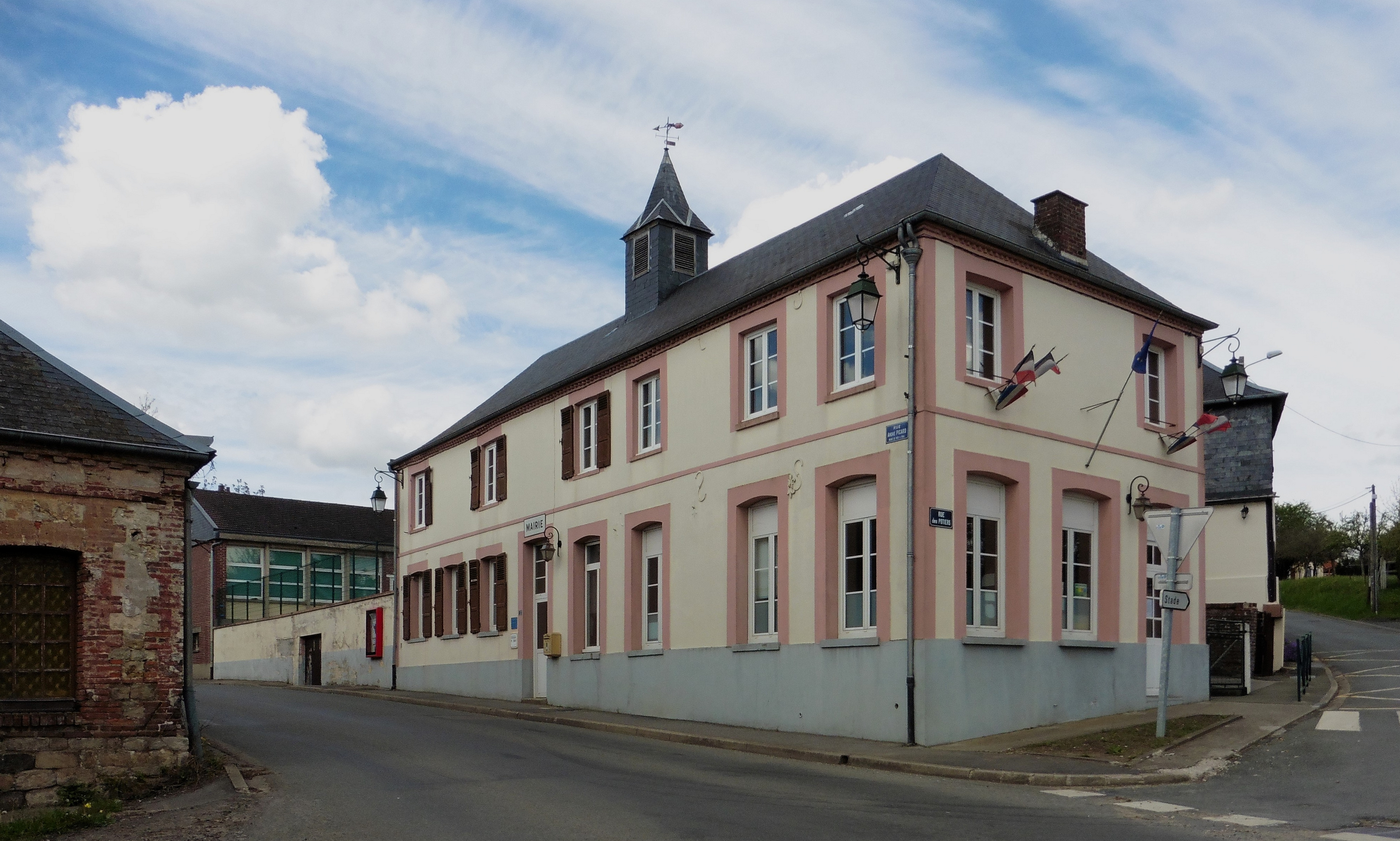 la mairie de Saint-Samson-la-Poterie Oise Picardie